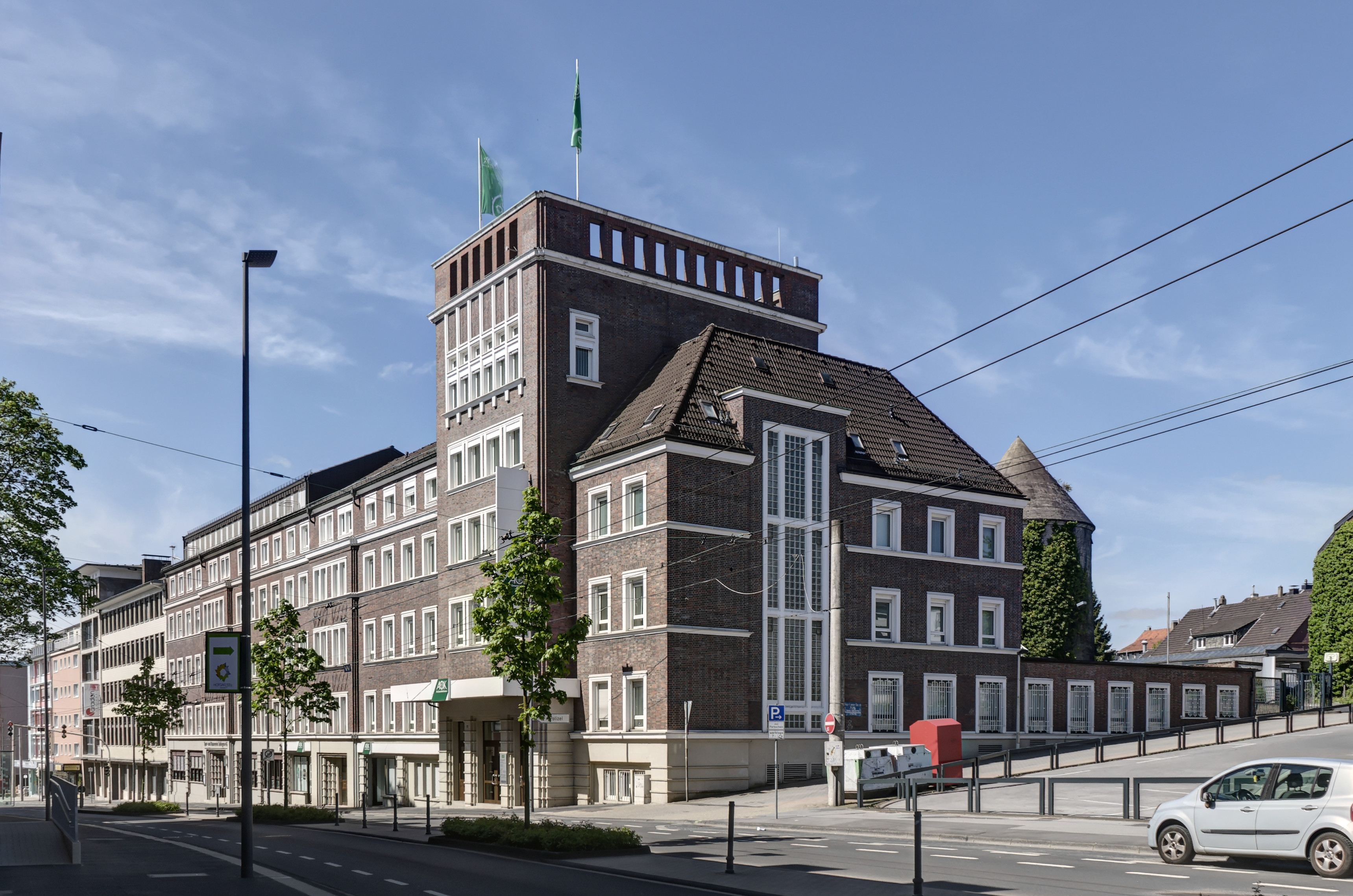 Solingen AOK-Haus, Kölner Str. 47, und Sitz des Spar- und Bauvereins Solingen